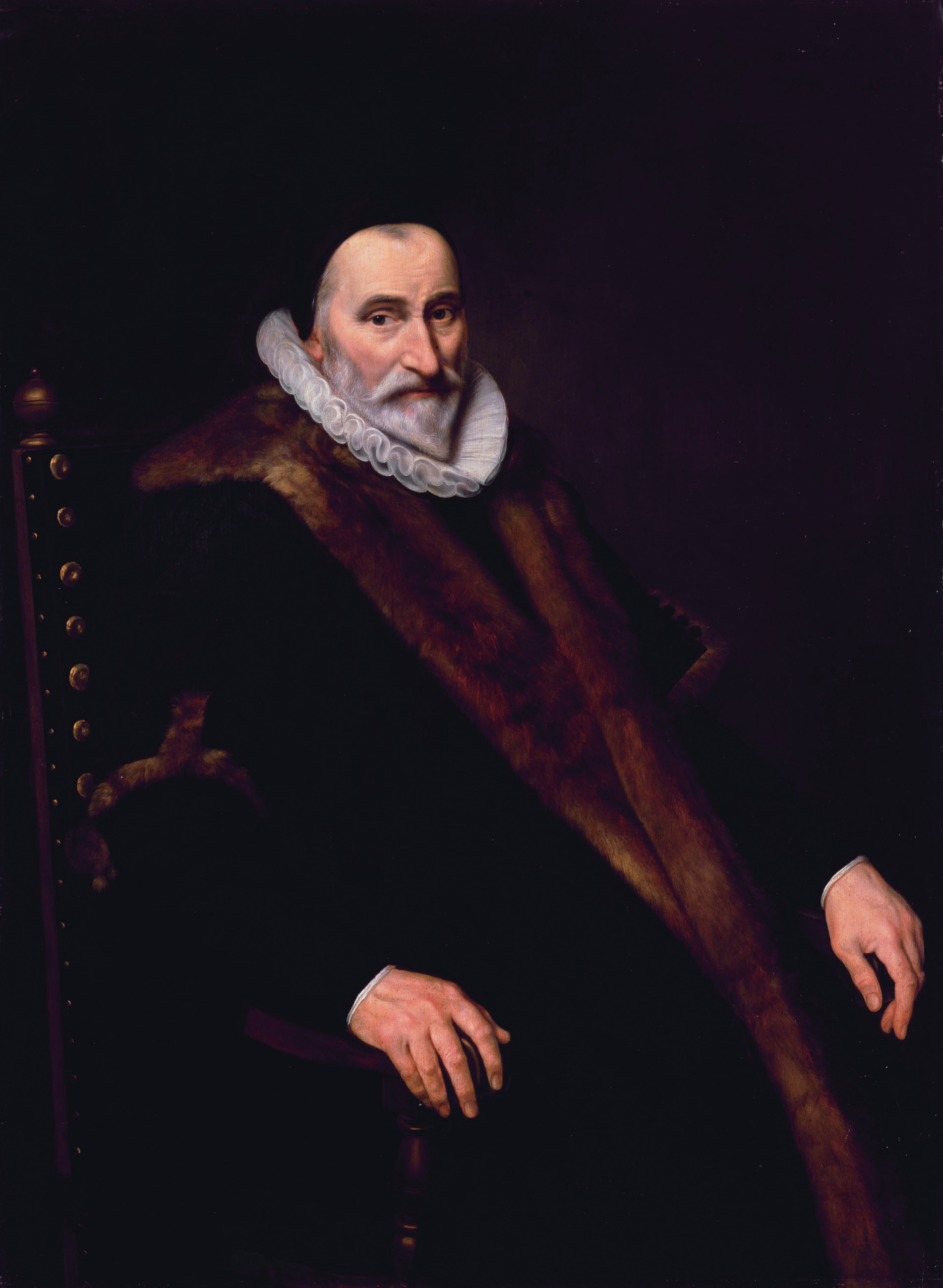 Pendant of File:Cornelis van der Voort 002.jpg